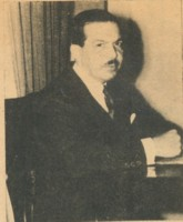 Retrato de Pedro Henríquez Ureña